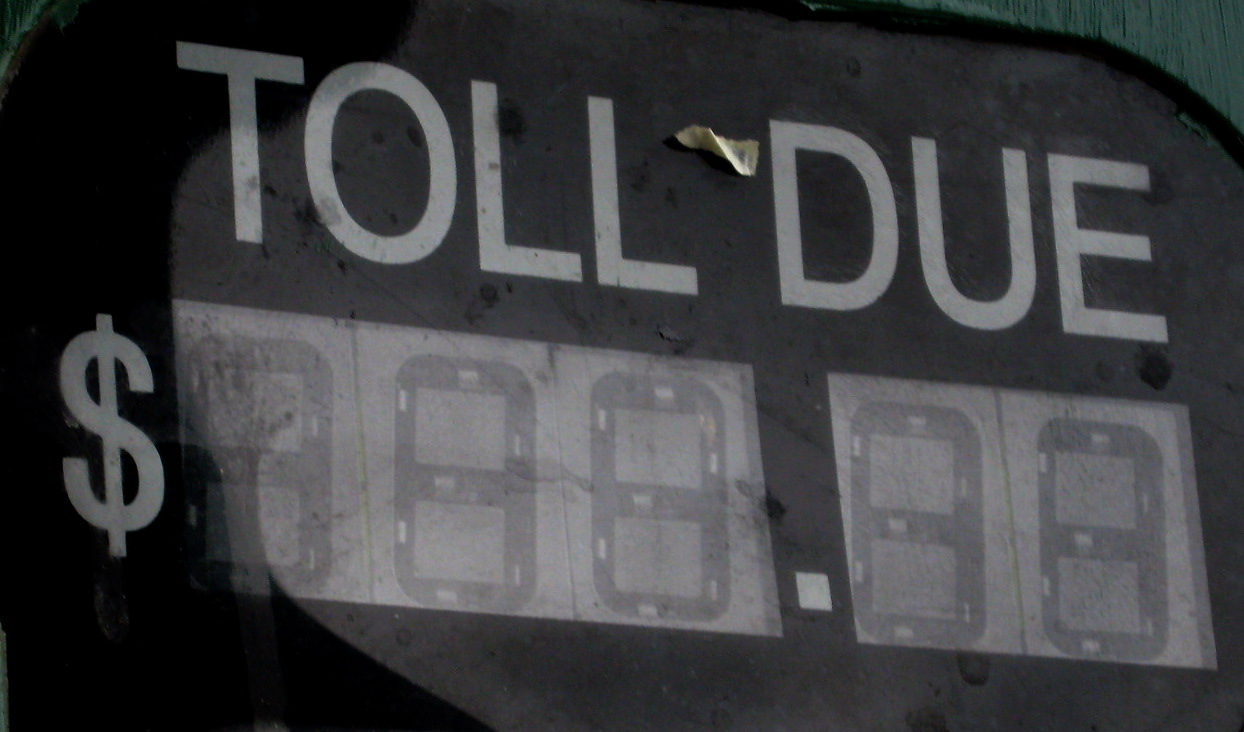 A vane display on the Creek Turnpike in Tulsa, Oklahoma.